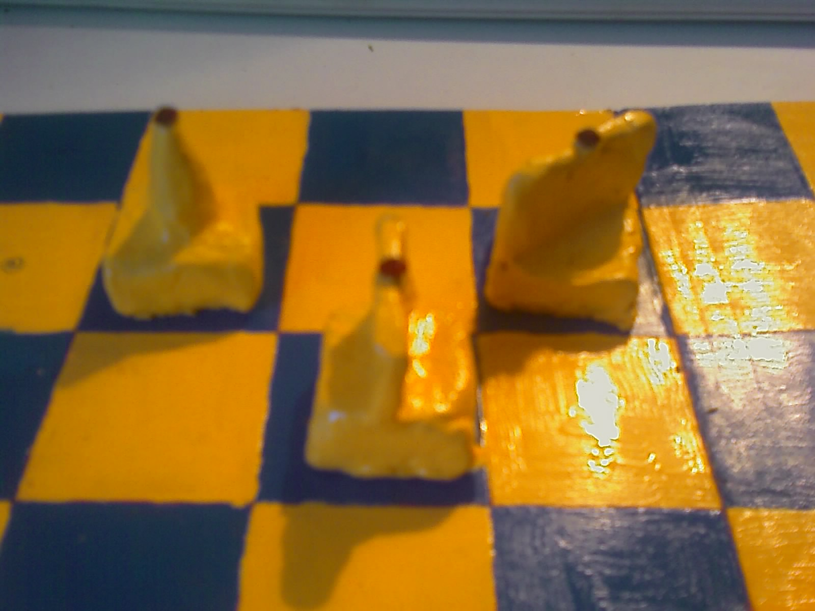 Jefes